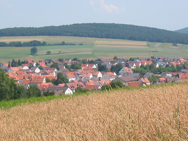 Wartenberg-Landenhausen. Ortskern aus südlicher Richtung fotografiert.